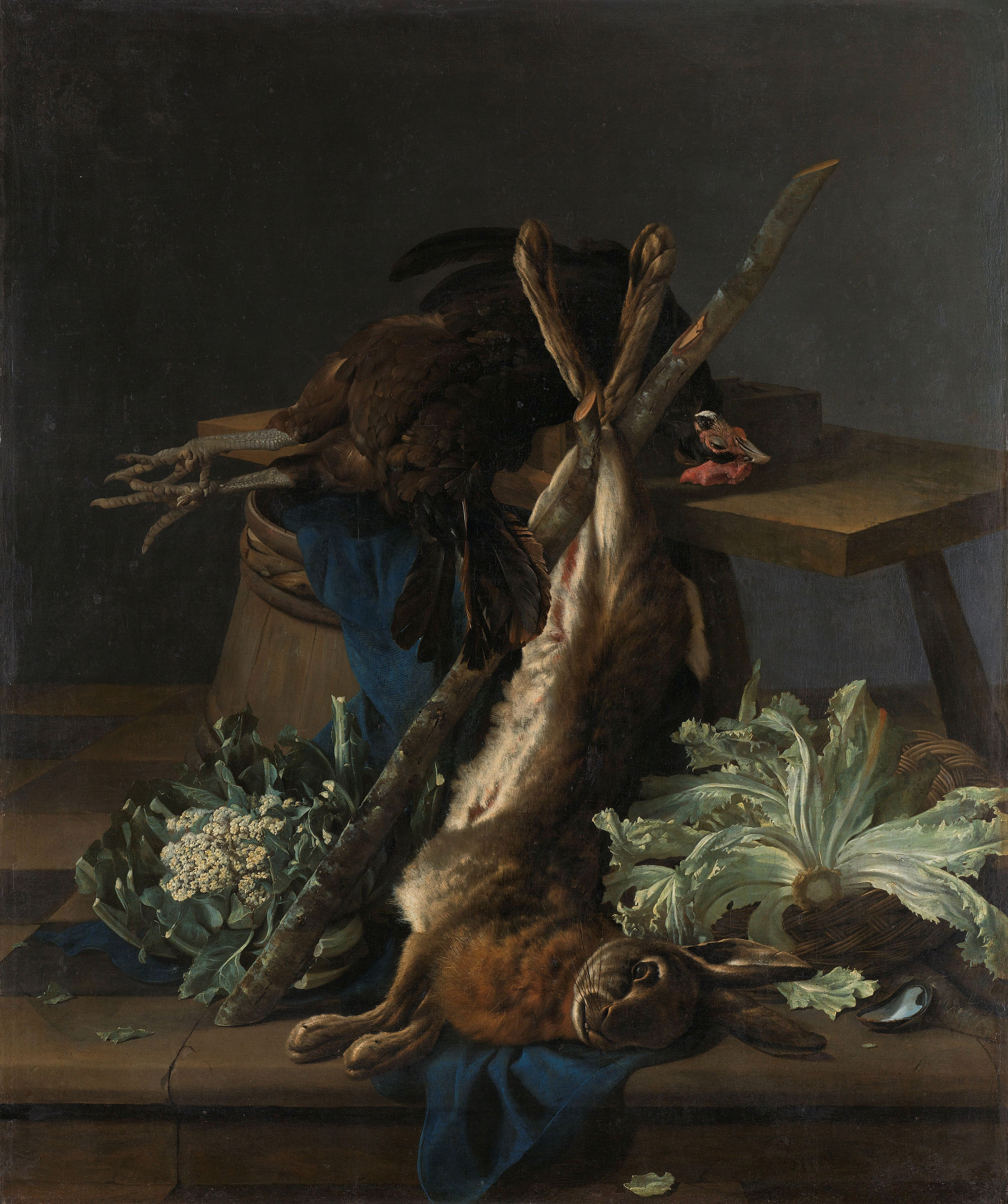 Stilleven met een haas gebonden aan een stok, een zwarte haan, een bloemkool en een stronk andijvie. Gerangschikt met een bankje, een emmer en een mand op de vloer bij een trede.